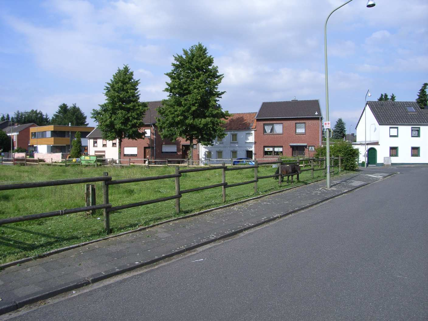 Erkelenz Stadtteil Oestrich